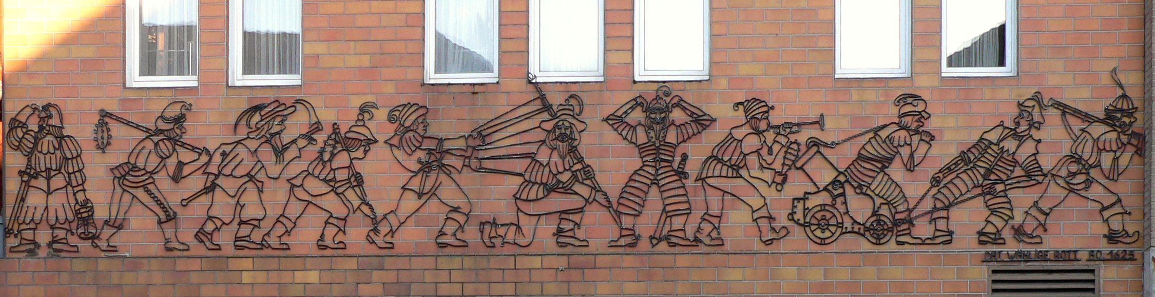 Dat wählige Rott Anno 1625